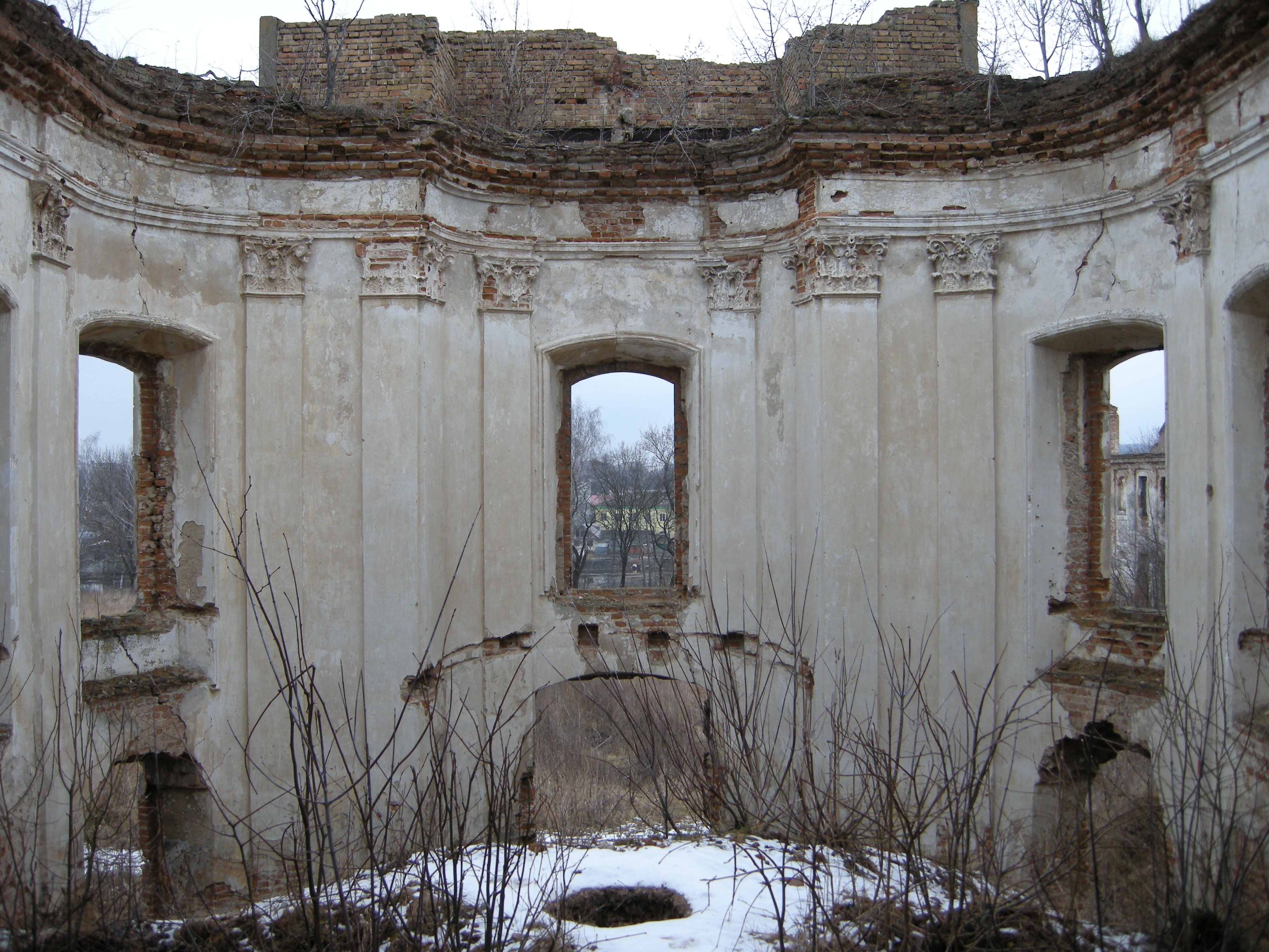 Вестибюль.